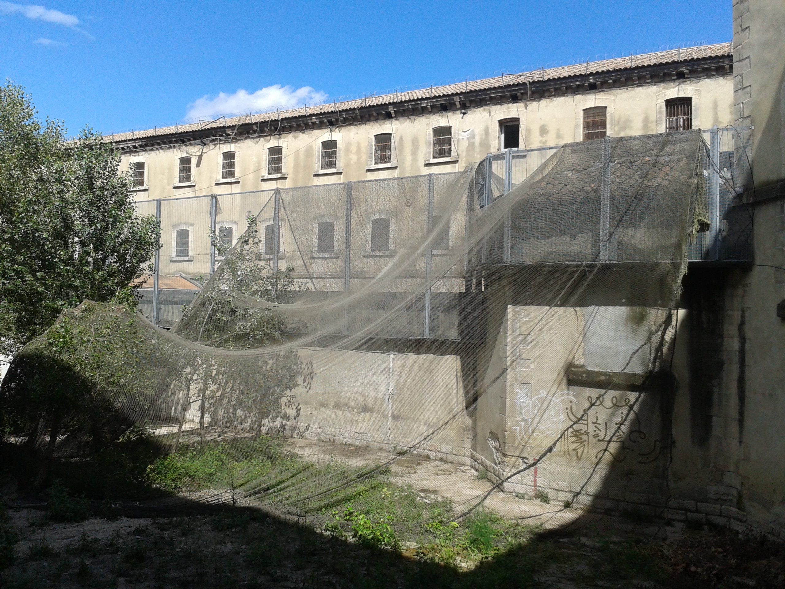 Avignon, Prison Sainte-Anne - Cour intérieure This document was produced using the Canon PowerShot SX230 HS lent by Wikimedia France.